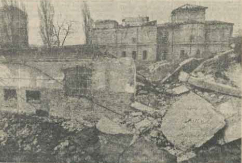 Mănăstirea Văcărești ianuarie 1987, poză publicată în revista 22